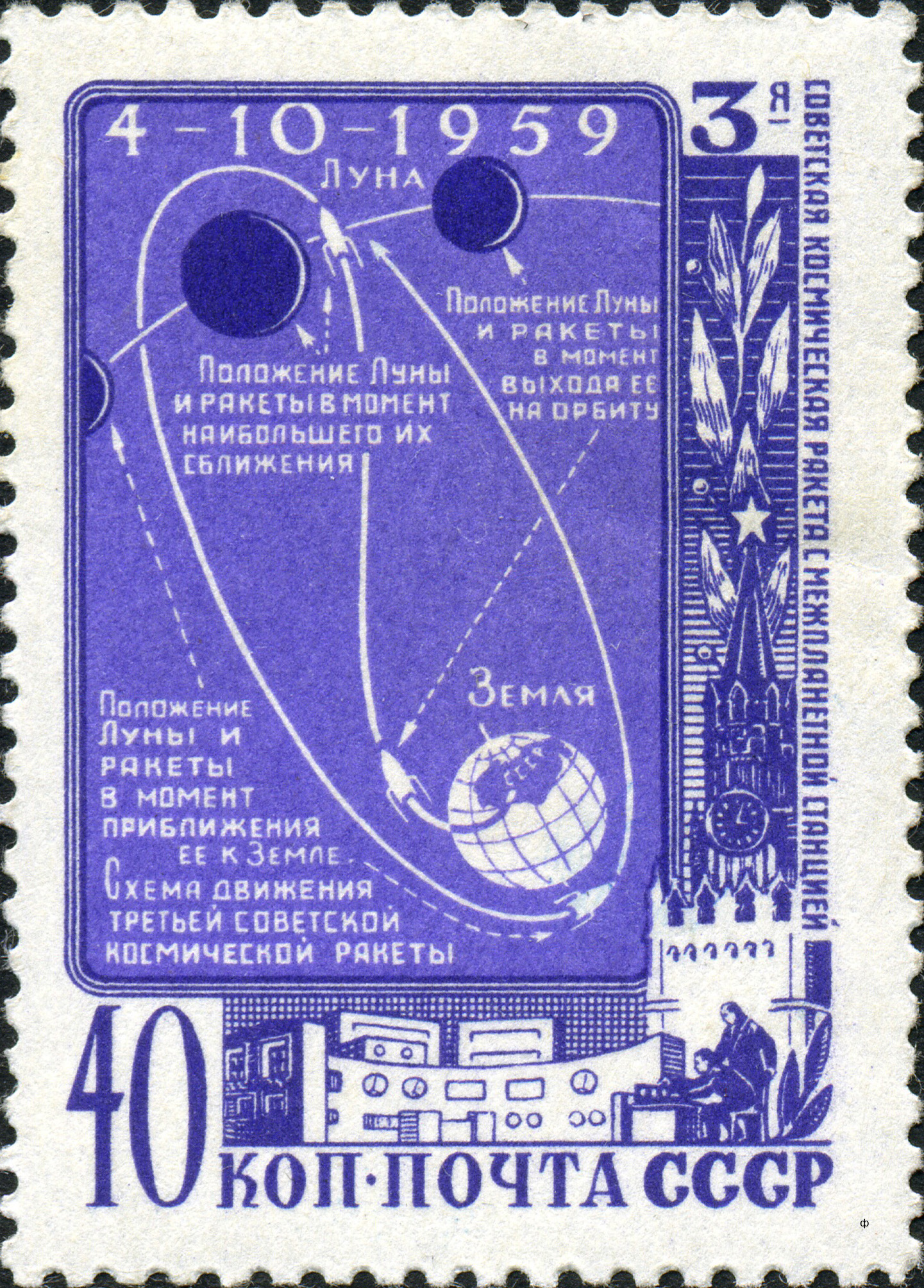 Марка СССР